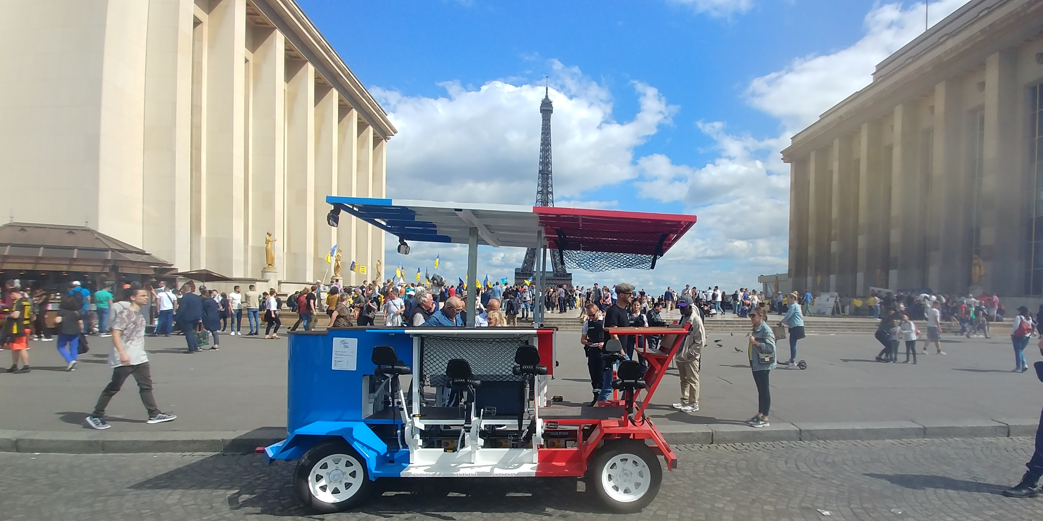 Balades insolites à vélo